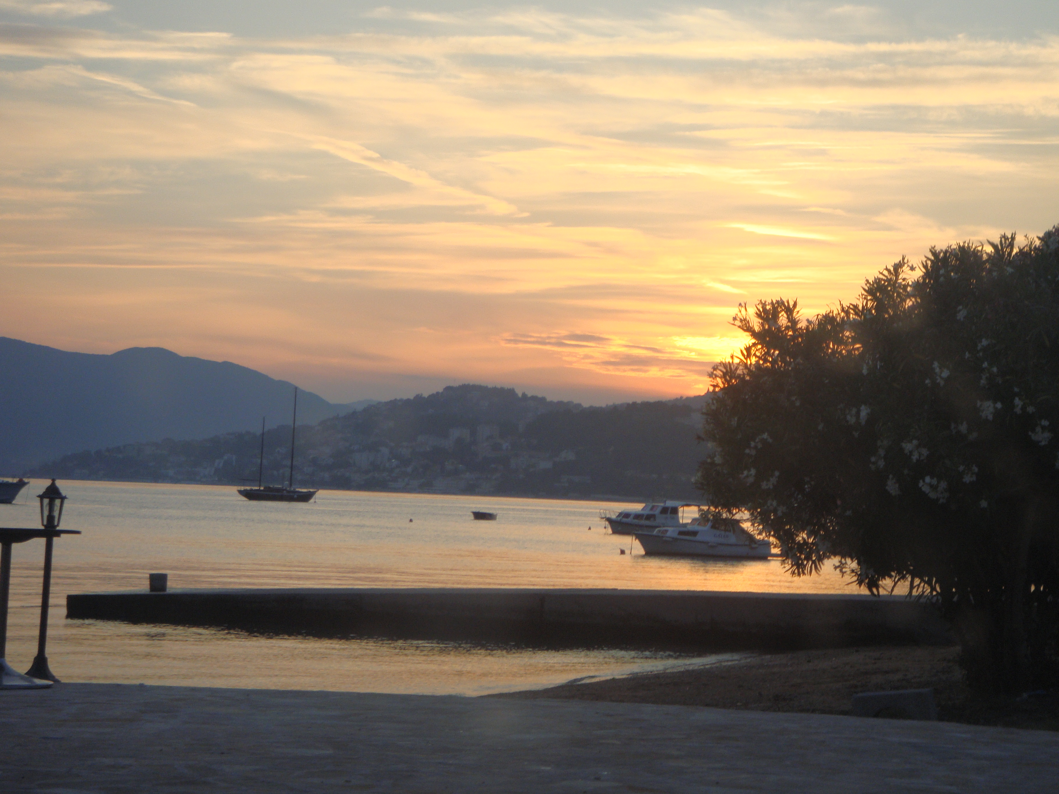 Kumbor, Montenegro